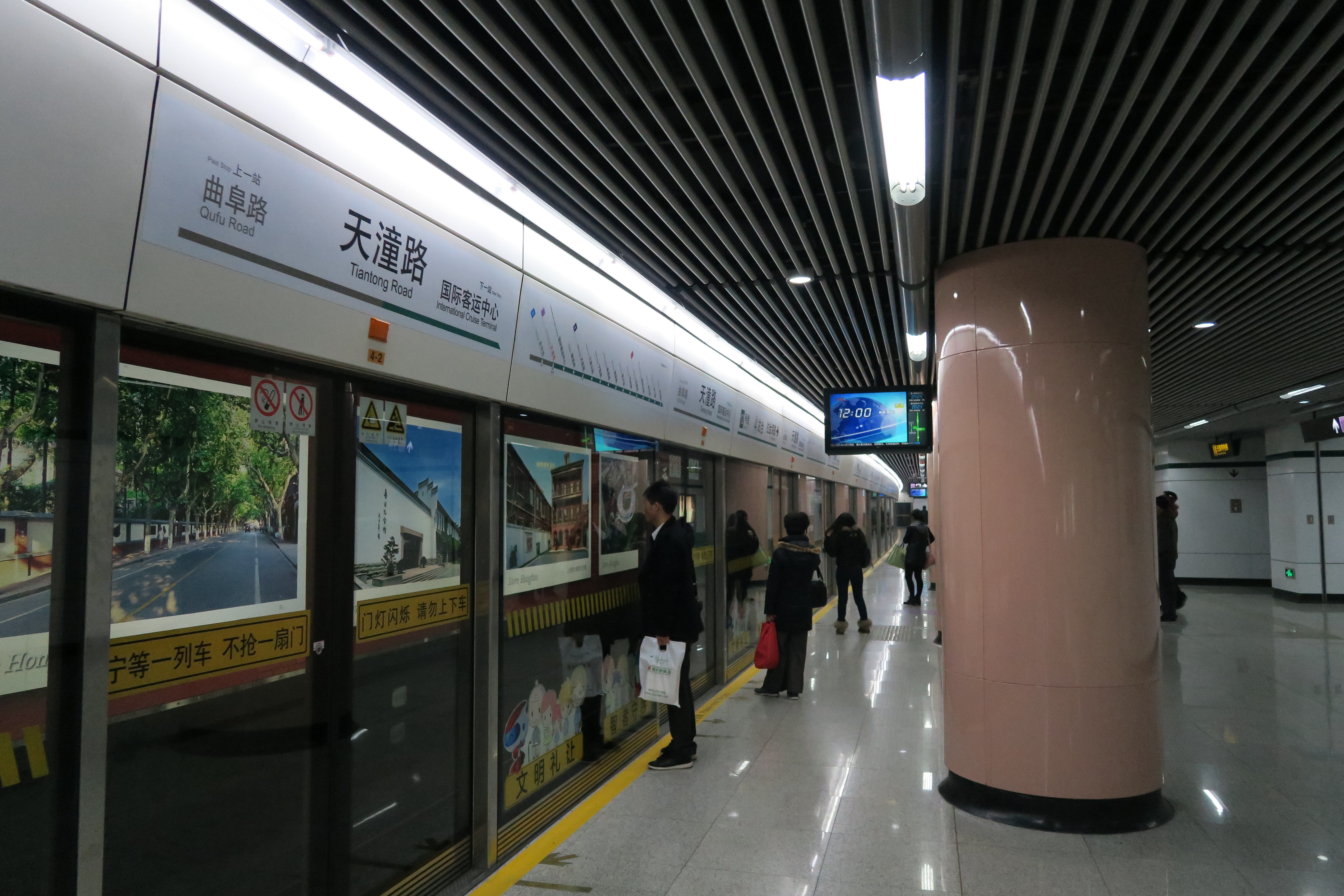 12号线天潼路站